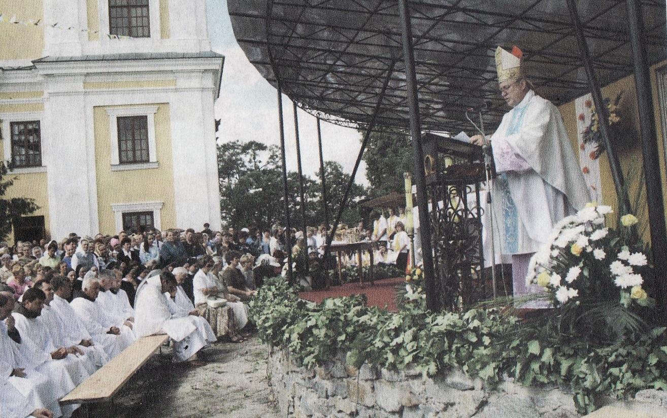 Костел Полонне 400 років